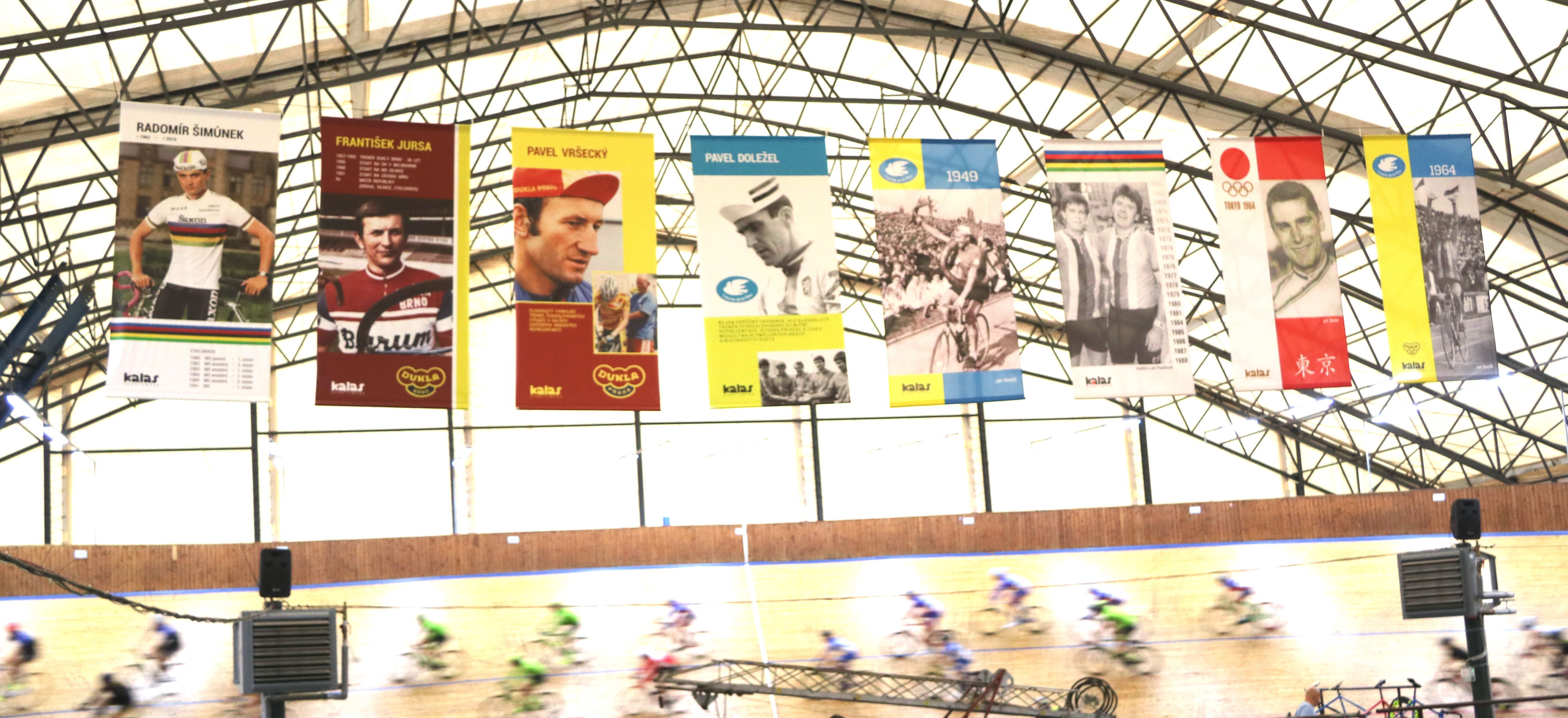 Prvních 9 osobností, které byly uvedeny do Síně slávy české cyklistiky při jejím založení v roce 2014 a dále v letech 2015 a 2016. Portréty pod střechou velodromu v Praze-Motole.